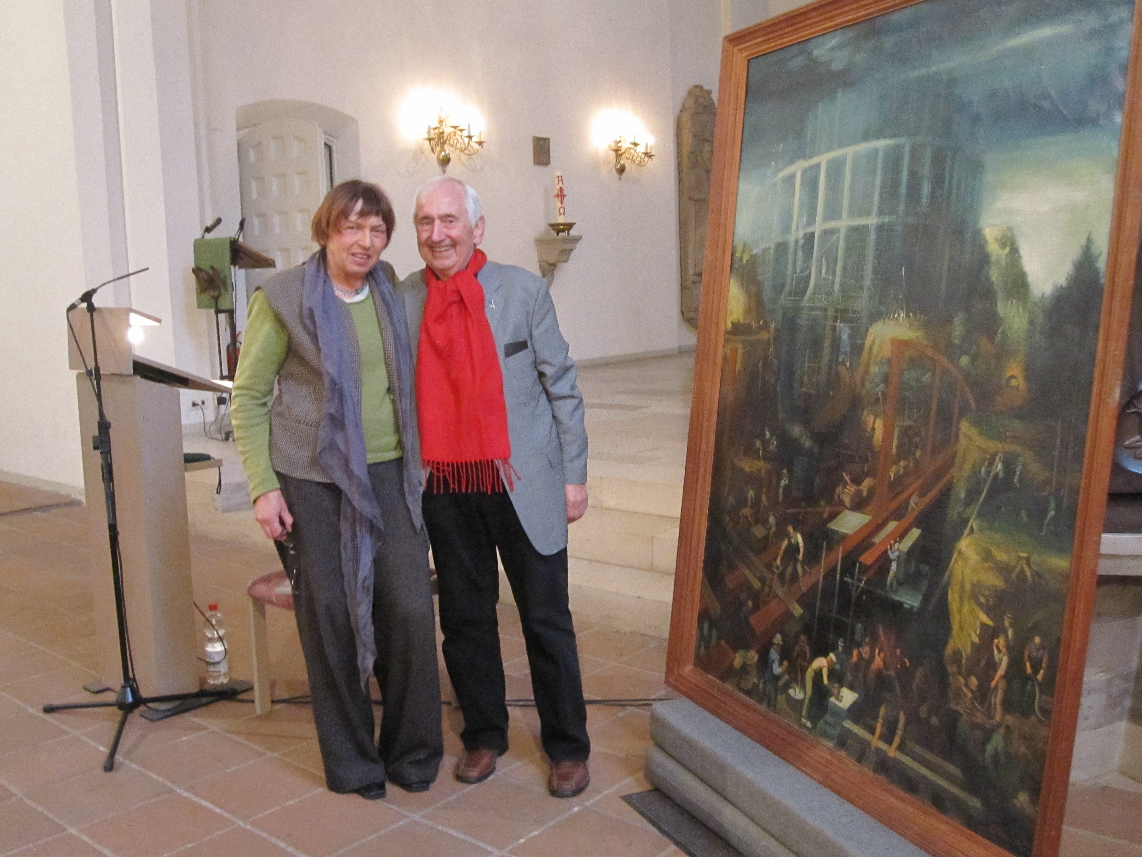 Juliane Ische-Thoms (Tochter des Künstlers Ernst Thoms) und Stadtsuperintendent i.R. Hans Werner Dannowski vor dem Gemälde Turmbau (1937) von Ernst Thoms. Bildbesprechung in der Kreuzkirche von Hannover am 12. Oktober 2011.